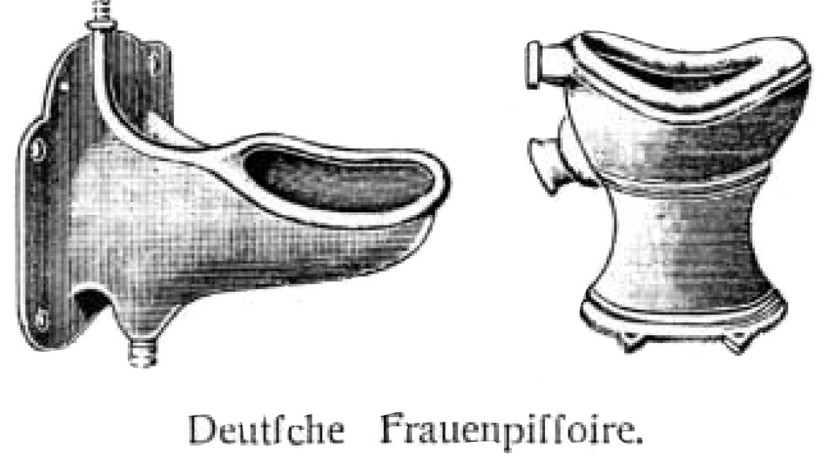 Damenurinale von Villeroy und Boch, 1908